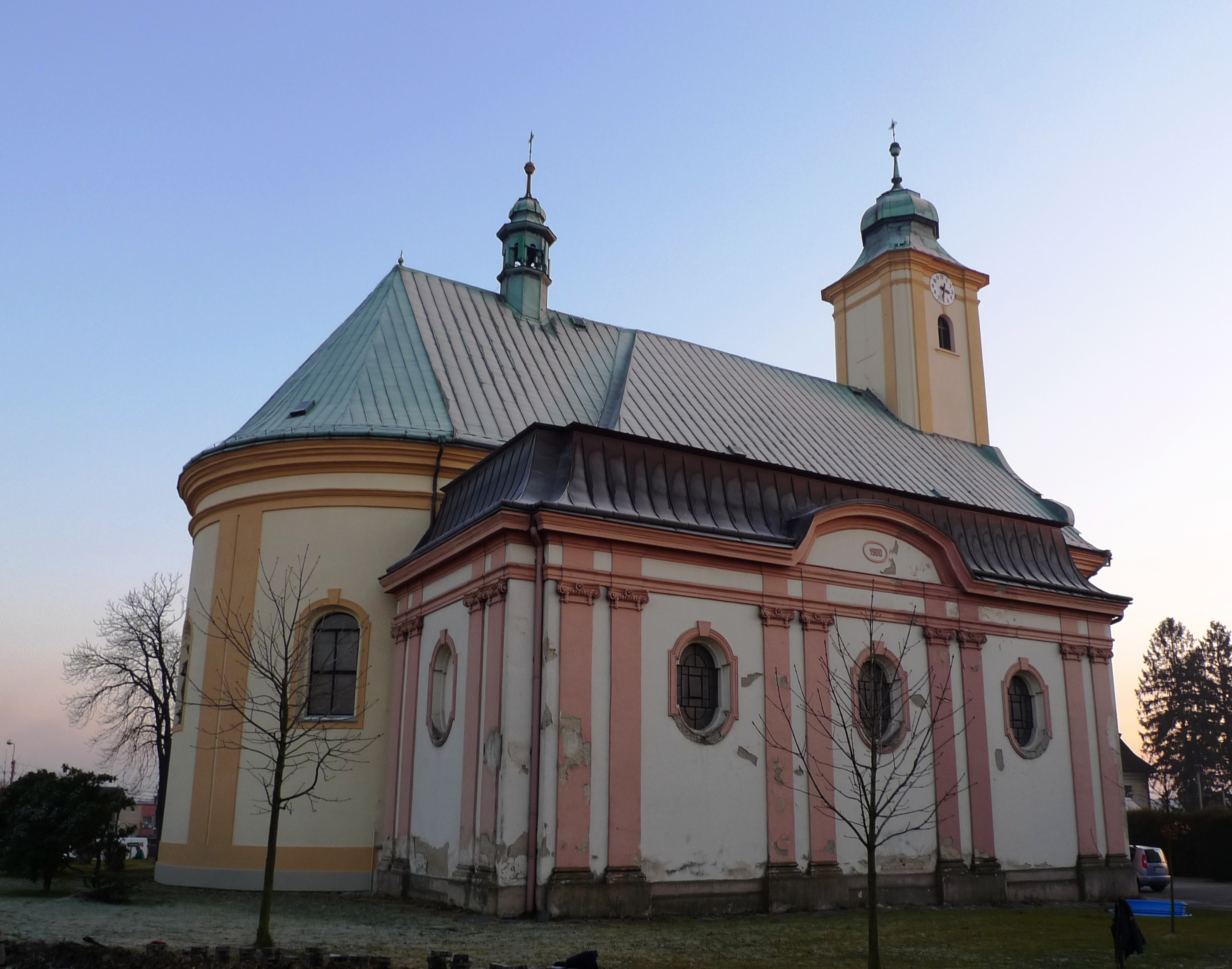 Kostel svatého Jana Nepomuckého